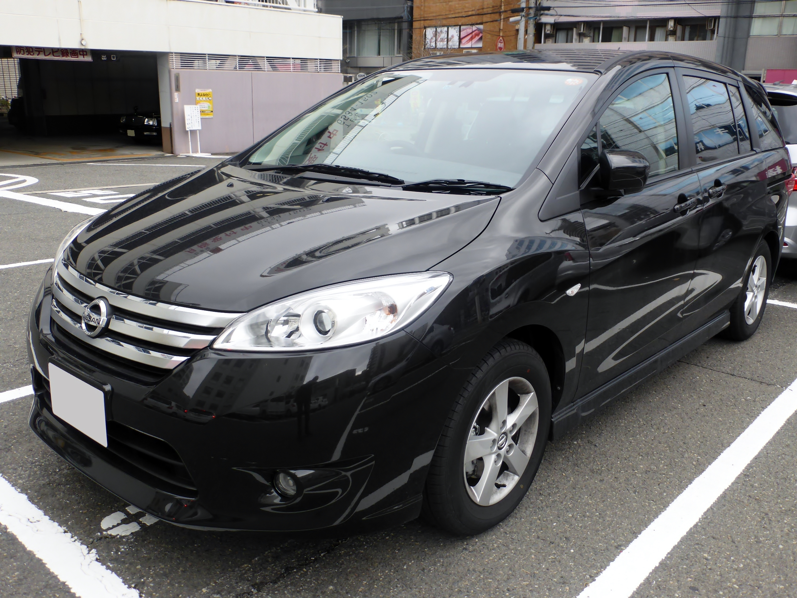 B35型日産・ラフェスタハイウェイスターJパッケージをフロントから撮影。